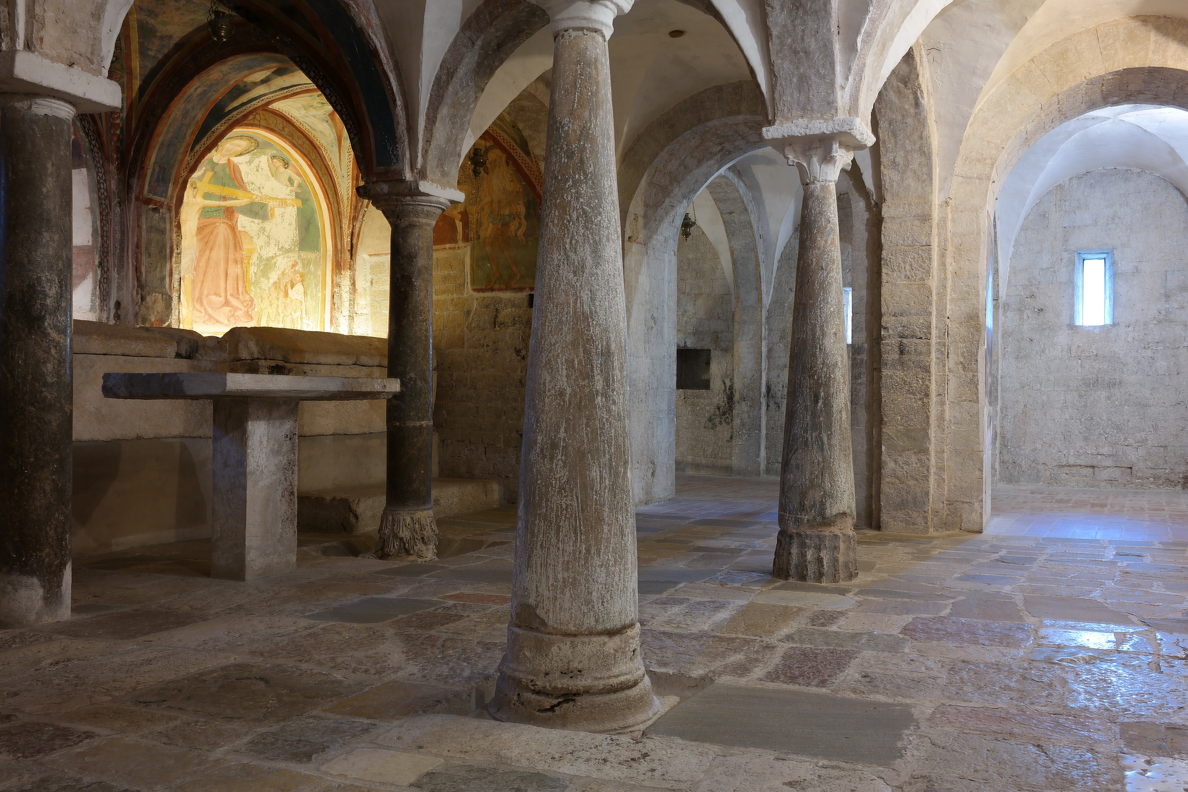 Cripta della Chiesa di San Ponziano a Spoleto